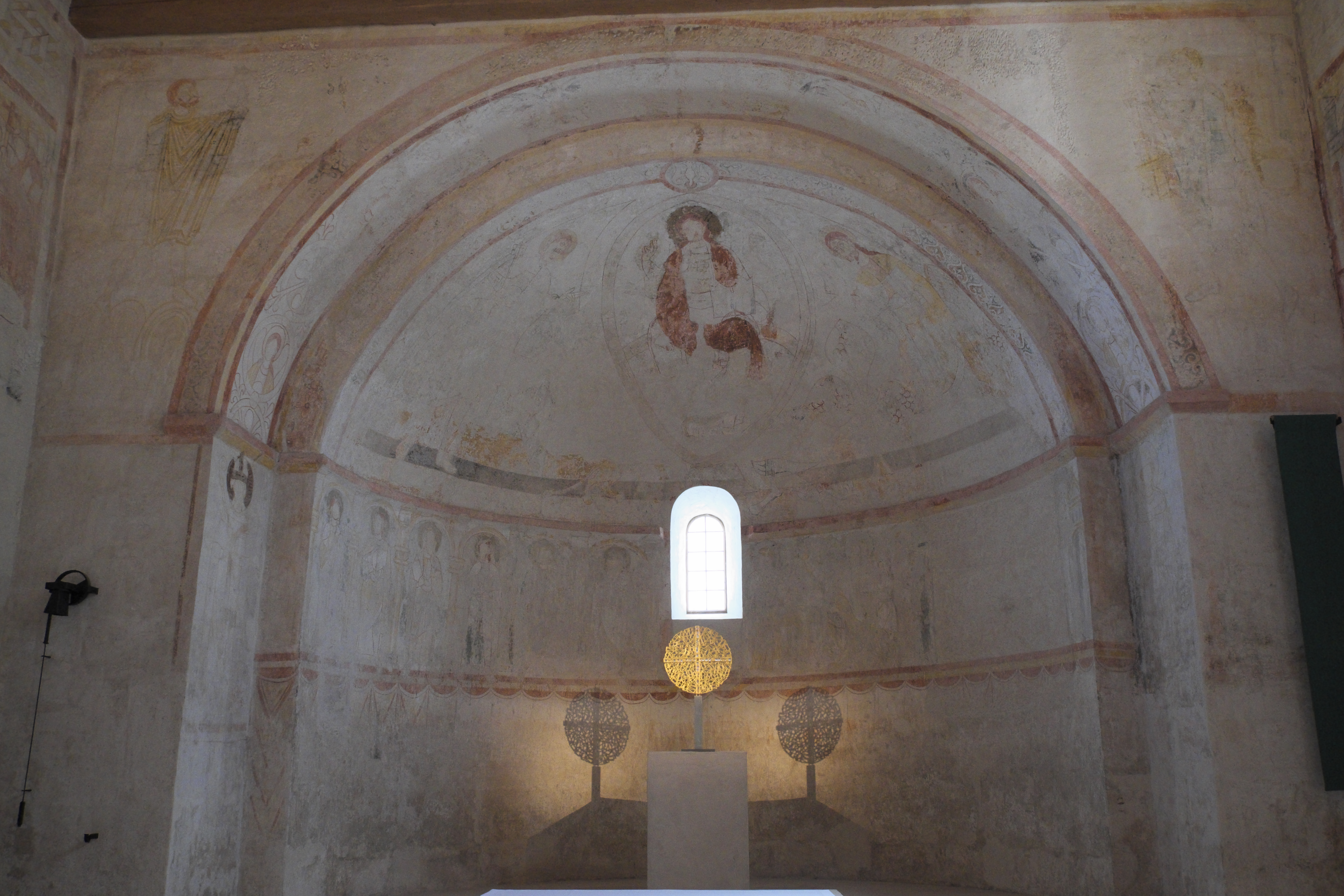 Katholische Filialkirche St. Aegidius in Keferloh im Landkreis München (Bayern/Deutschland), Reste romanischer Wandmalerei